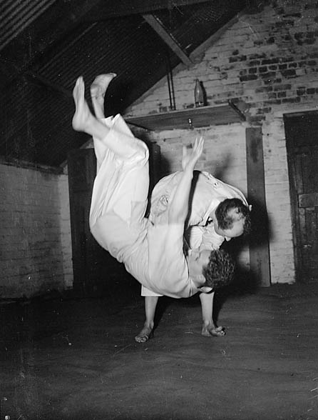 Teitl Cymraeg/Welsh title: Grŵp Jiwdo Caerdydd. Ffotograffydd/Photographer: Geoff Charles (1909-2002) Dyddiad/Date: 01/10/1951 Cyfrwng/Medium: Negydd ffilm / Film negative Cyfeiriad/Reference: (gch02275) Rhif cofnod / Record no.: 3368284 Rhagor o wybodaeth am gasgliad Geoff Charles yn Llyfrgell Genedlaethol Cymru More information about the Geoff Charles Collection at the National Library of Wales Mae ffotograffau Geoff Charles hefyd yn rhan o Broject Europeana Libraries Geoff Charles' photographs also form part of the Europeana Libraries Project